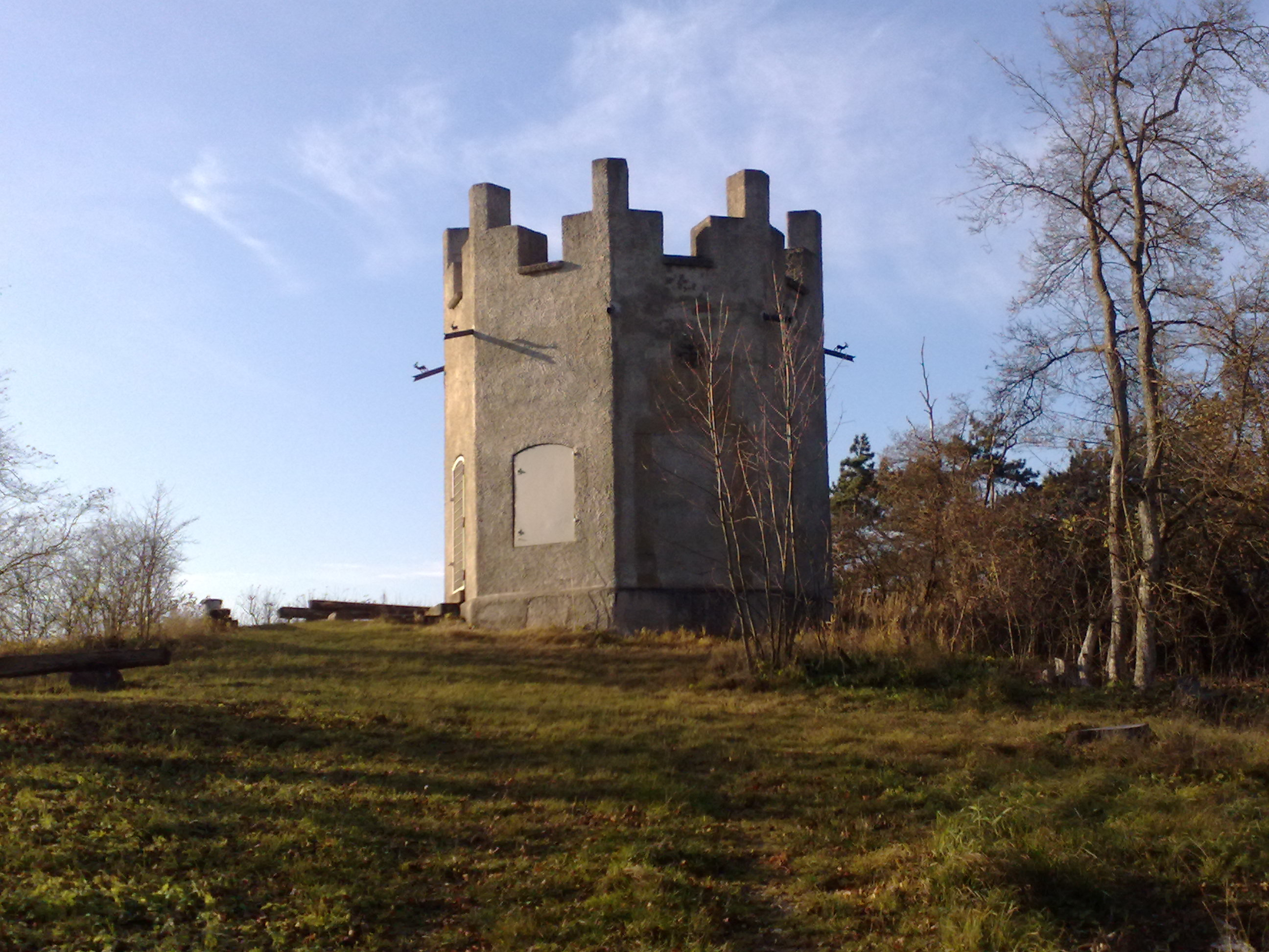 Blick auf den Jägerturmskopf im Hainberg mit Jägerturm. Gelegen im Landschaftsschutzgebiet „Hainberg, Wohldenberg, Braune Heide, Klein Rhüdener Holz und angrenzende Landschaftsteile“ (LSG WF 00031).